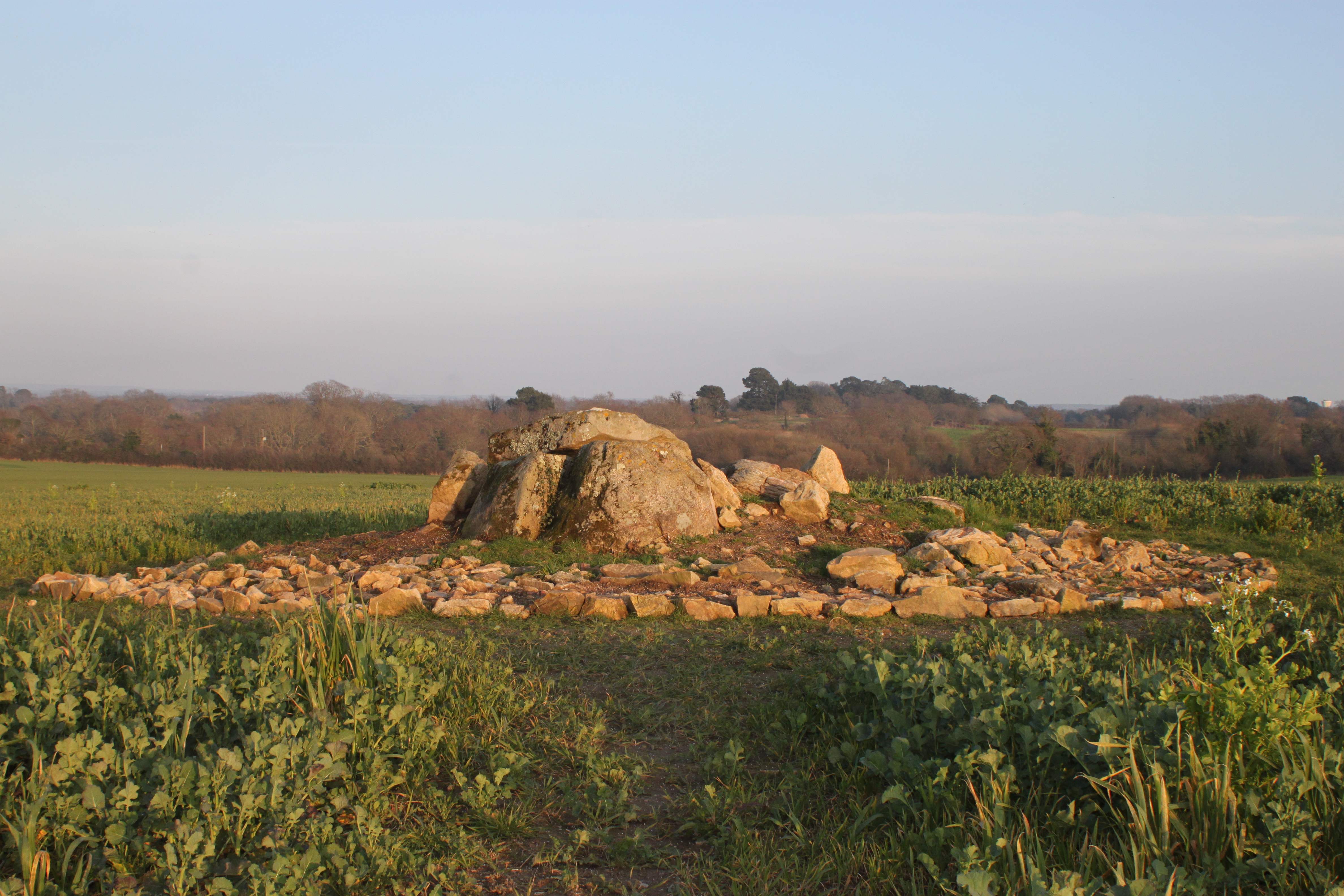 Dolmen de Kerhenry, Fr-56-Arradon.